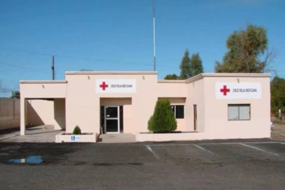 Delegacion Cruz Roja municipio de Fronteras Sonora